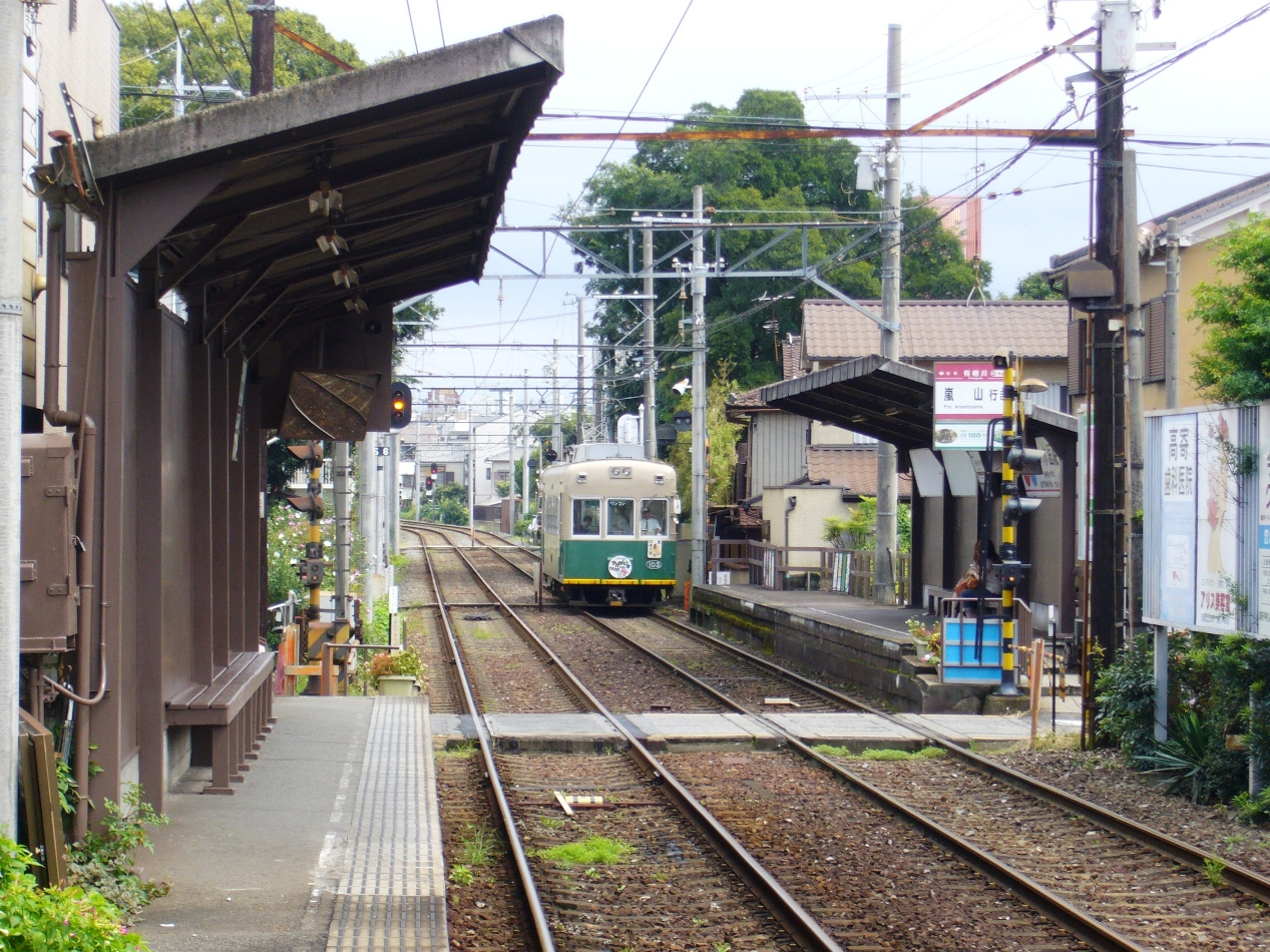 京福電気鉄道嵐山本線有栖川駅。四条大宮駅行きホームから嵐山駅行きホームを望む。嵐山行き電車が接近中。2007年9月10日に投稿者が撮影。